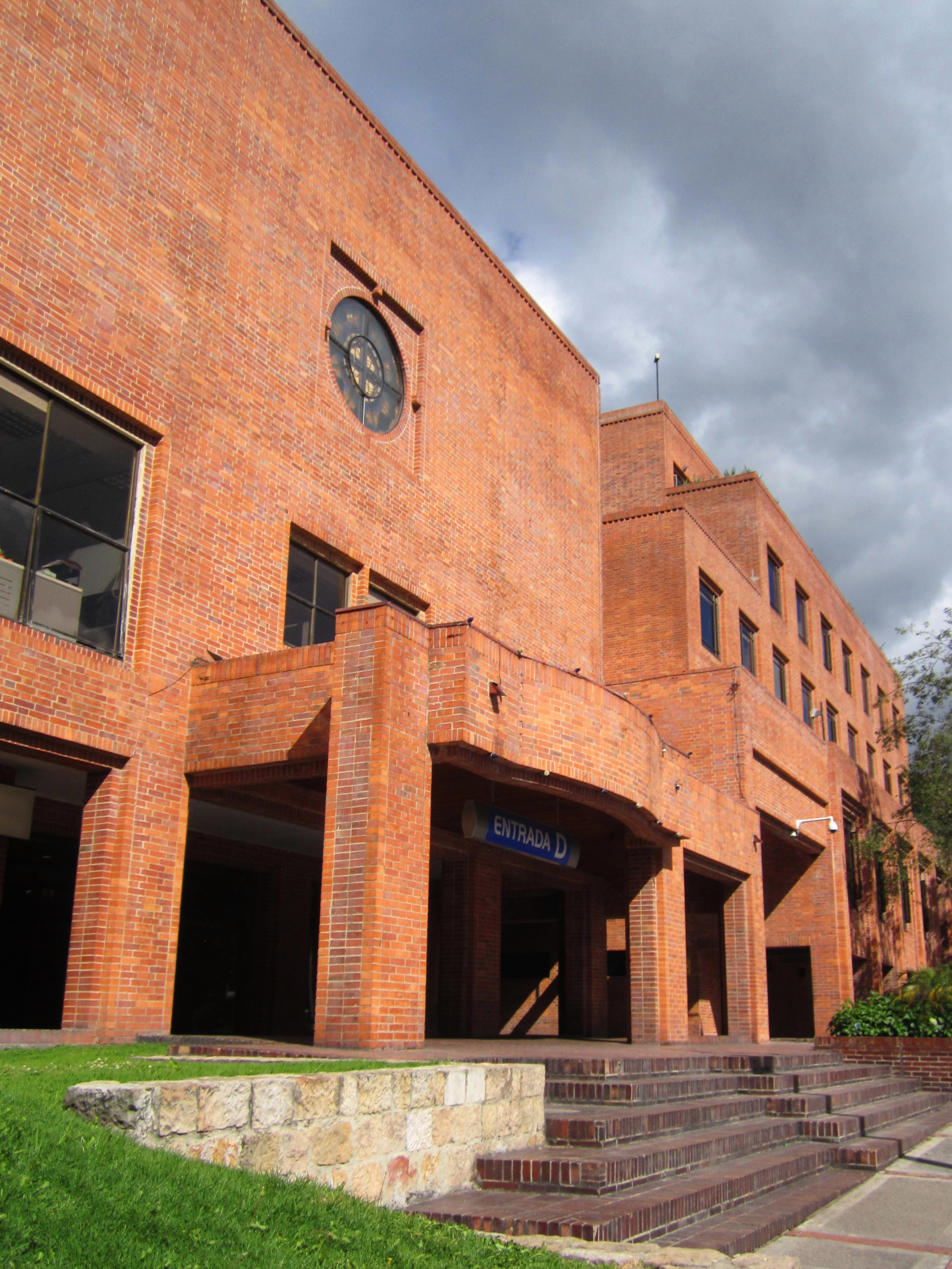 Entrada sur del c.c. St.Bárbara n la localidad de Usaquén en Bogotá